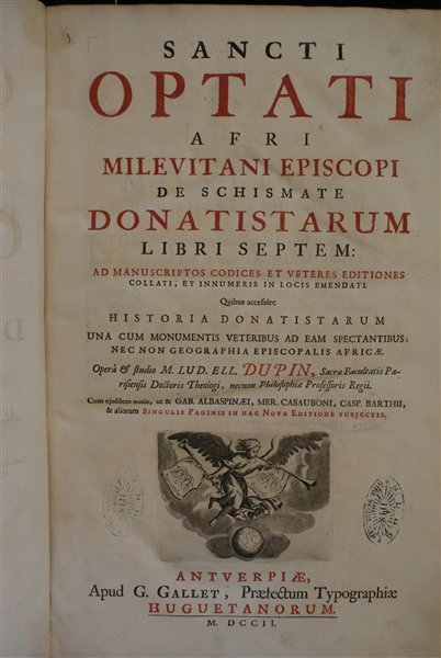 Optat de Mileve Edition de Du Pin